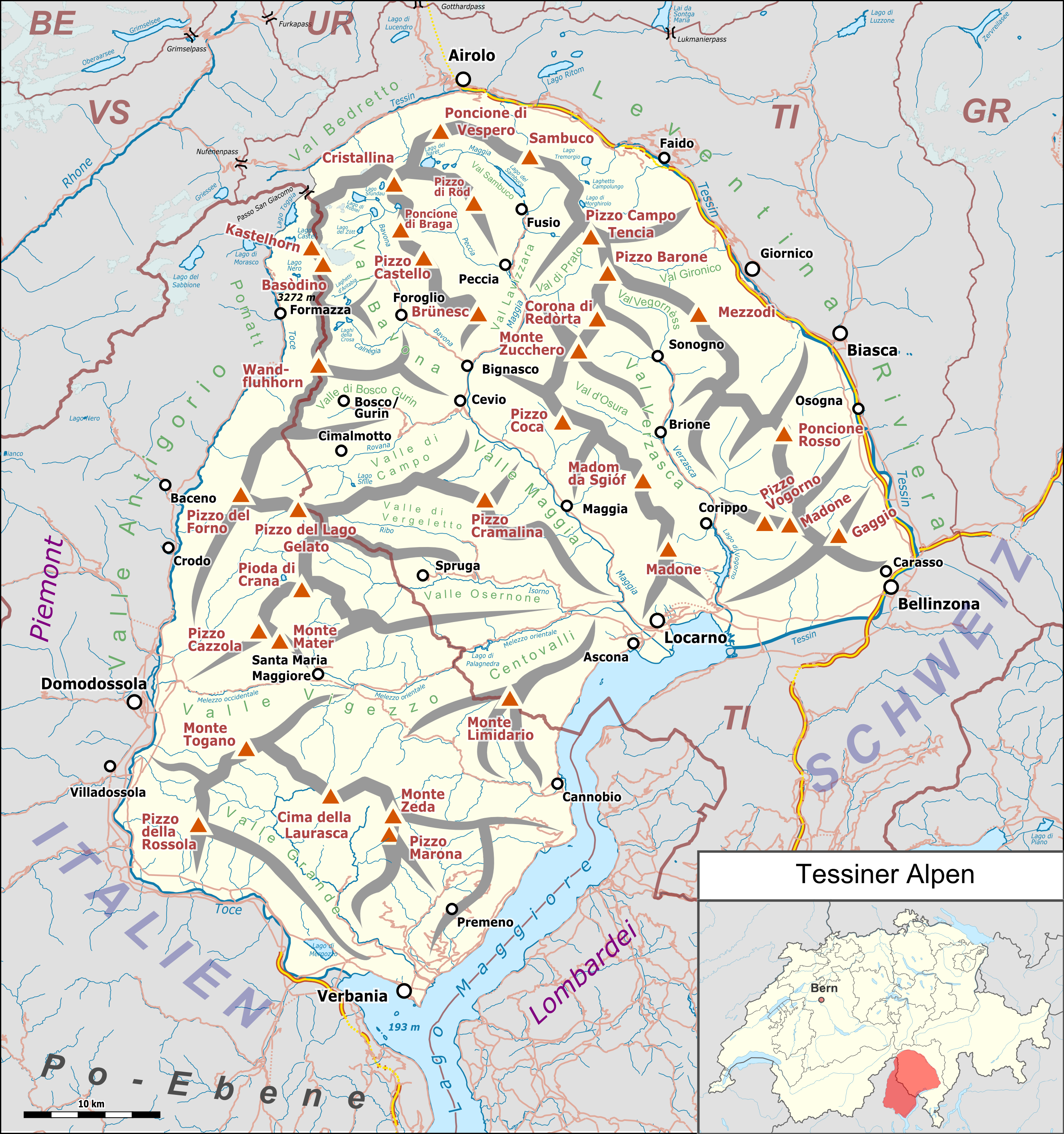 Lagekarte der Tessiner Alpen